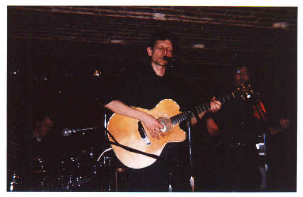 François Borne, en concert à Lille Takamine guitar [1]